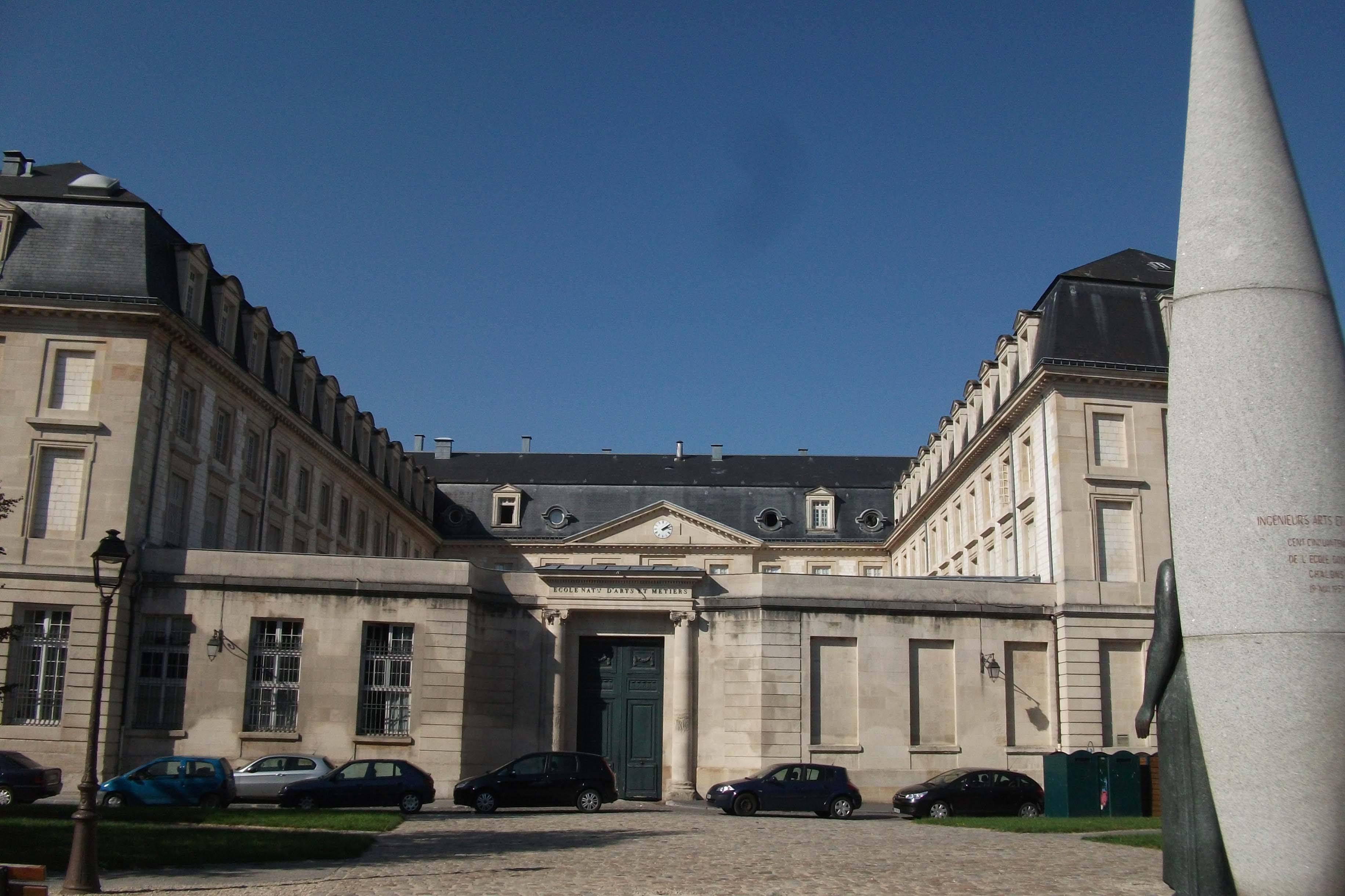 Entrée de l'ENSAM à Châlons avec vue de dos une statue pour le centenaire de l'école. La statue originale avait été fondue par les alleamnds cette version est de 1956.